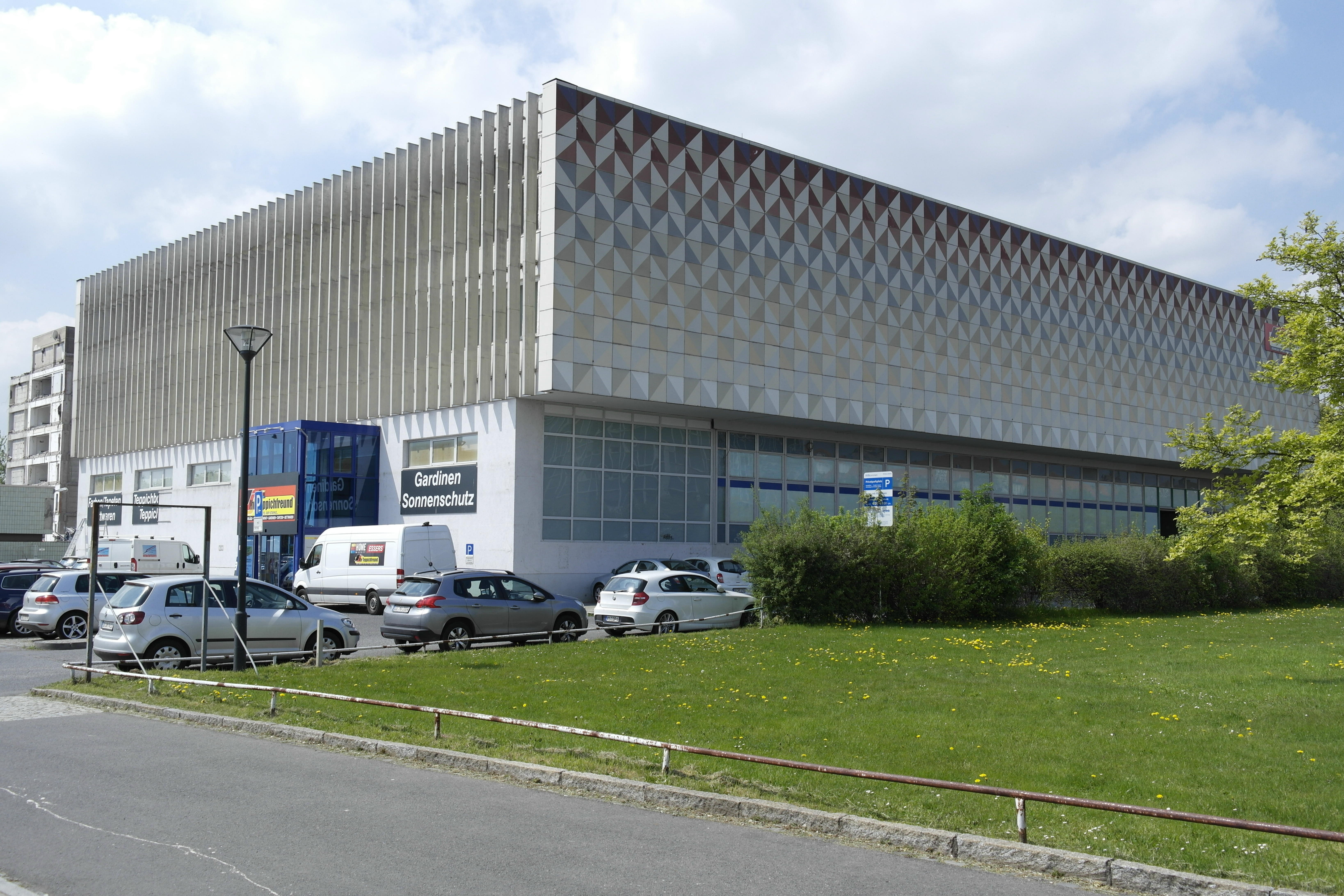 Dresden, Robotrongebäude, ehemaliges Rechenzentrum, Mai 2016